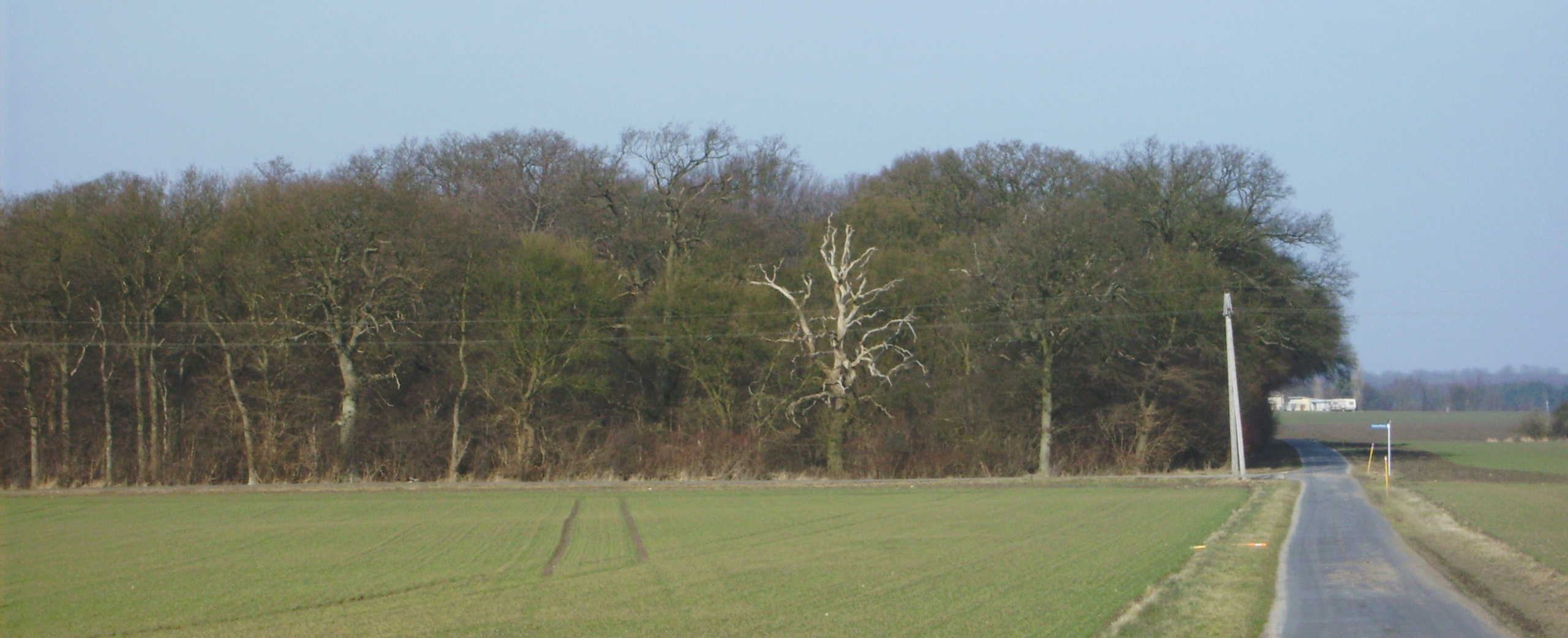 "Præstens Urskov" eller Karlslunde, er en lille fredet skov, der har ligget i urørt tilstand mindst siden 1924. A small forest in Denmark, untouchted since 1924